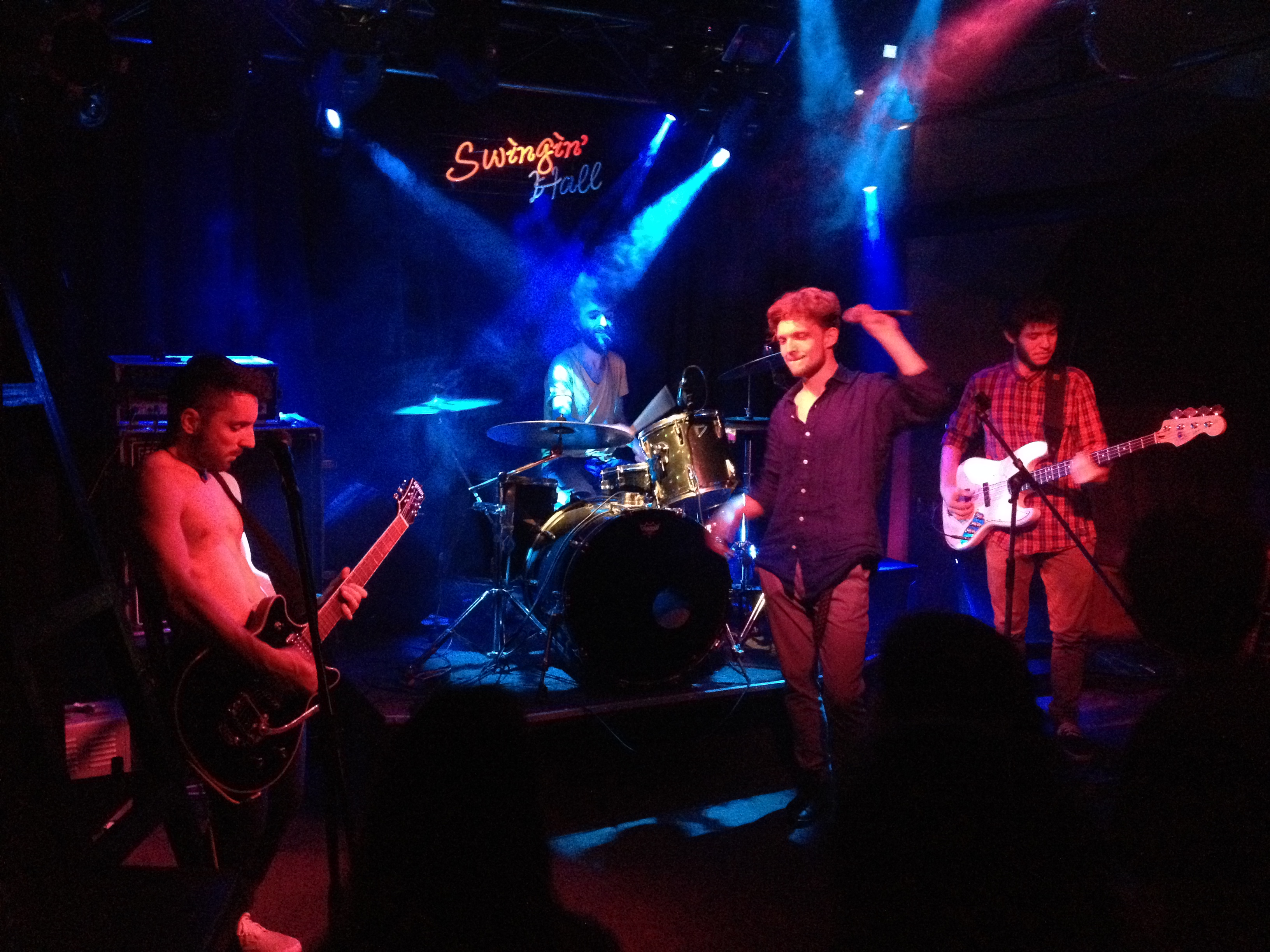 Krekhaus в Swingin' Hall, София, 23.5.2018.